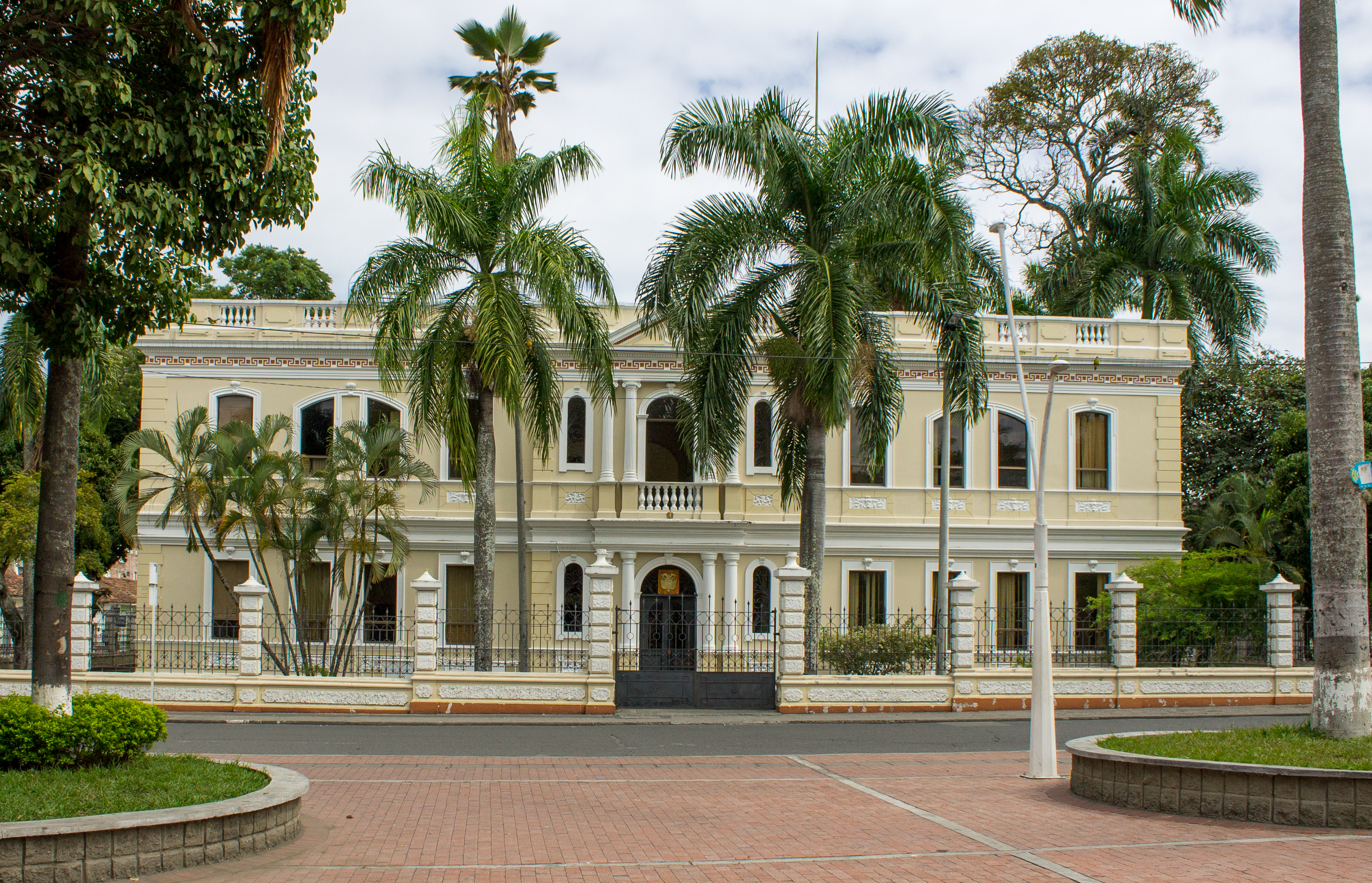 Palacio de Justicia en Tuluá.